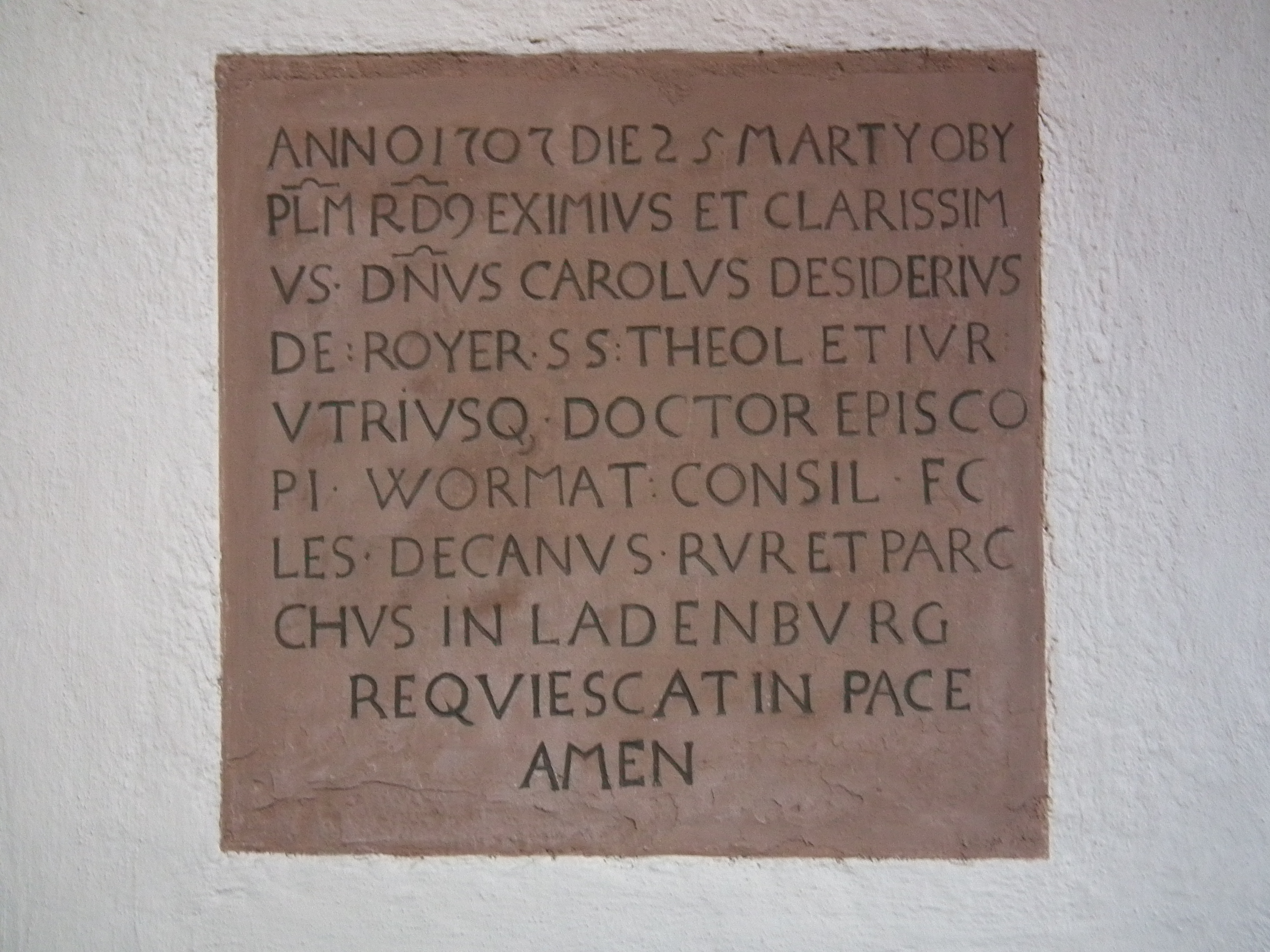 Inschrifttafel für Dr. Dr. Carolus Desiderius de Royer (gest. 1707), angebracht im südlichen Seitenschiff der katholischen Kirche St. Gallus in Ladenburg (Baden-Württemberg, Deutschland); er war der erste Pfarrer nach 1693. Text: Anno 1707 die 25 Martii obiit plm. rds. (d. h. plurimum reverendus) eximius et clarissimus, dominus Carolus Desiderius de Royer, S. S. Theol. et Jur. utriusque doctor, Episcopi Wormat. consil. eccles., decanus rur. et parochus in Ladenburg. Requiescat in pace. Amen.